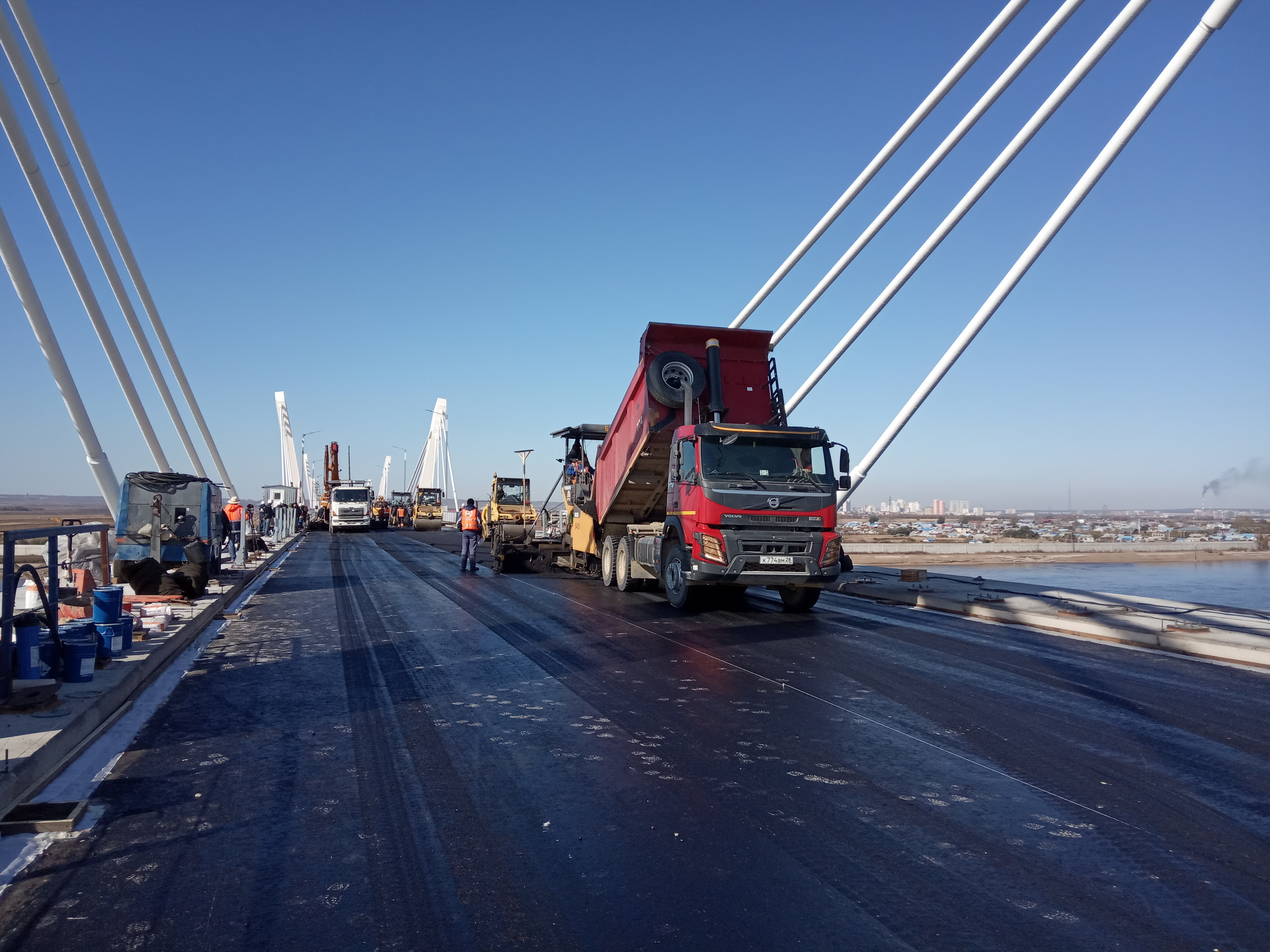 Строящийся мост через Амур